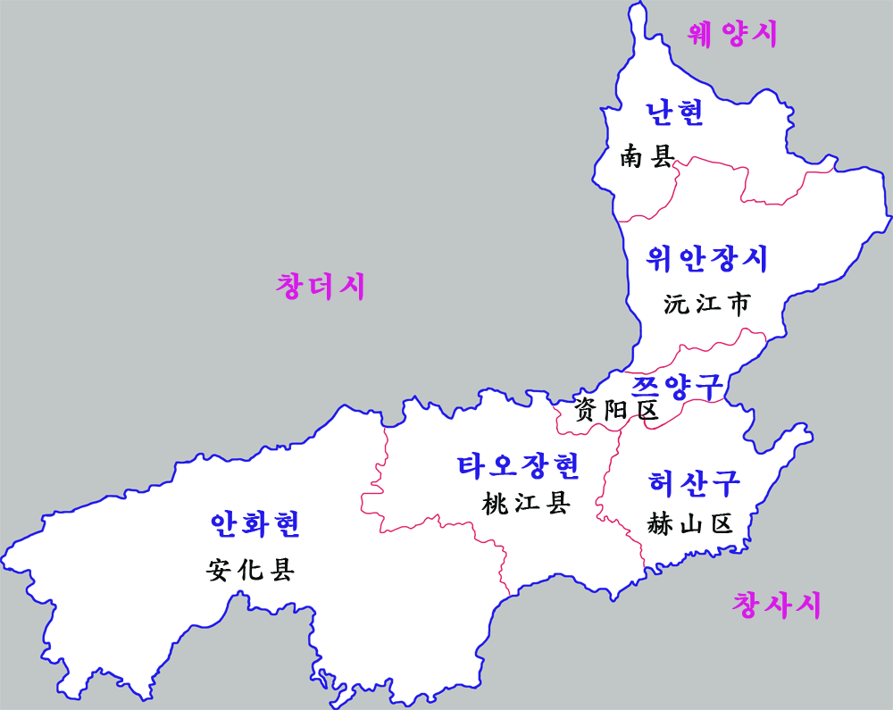 이양시 현급구역도